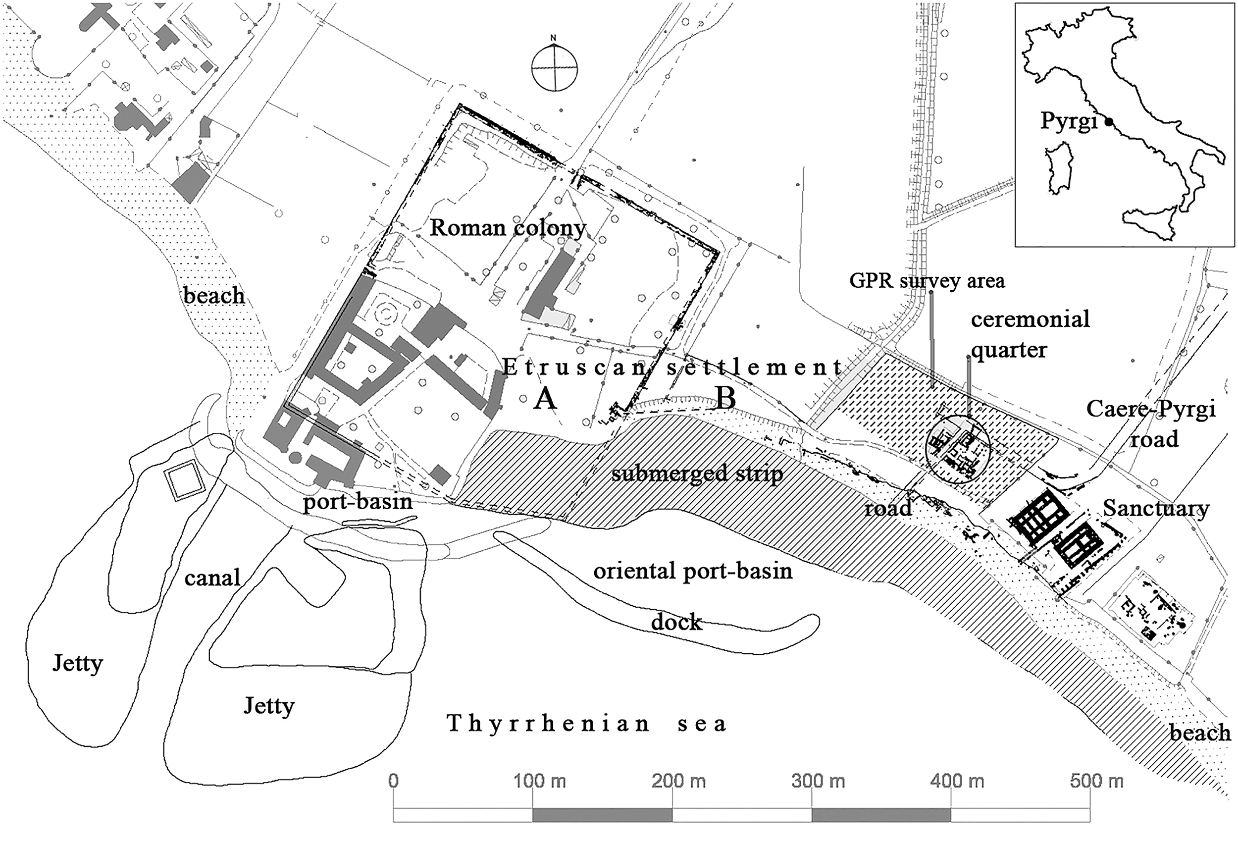 Pyrgi